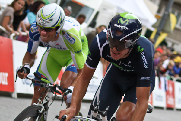 Kristjan Koren & Rui Costa